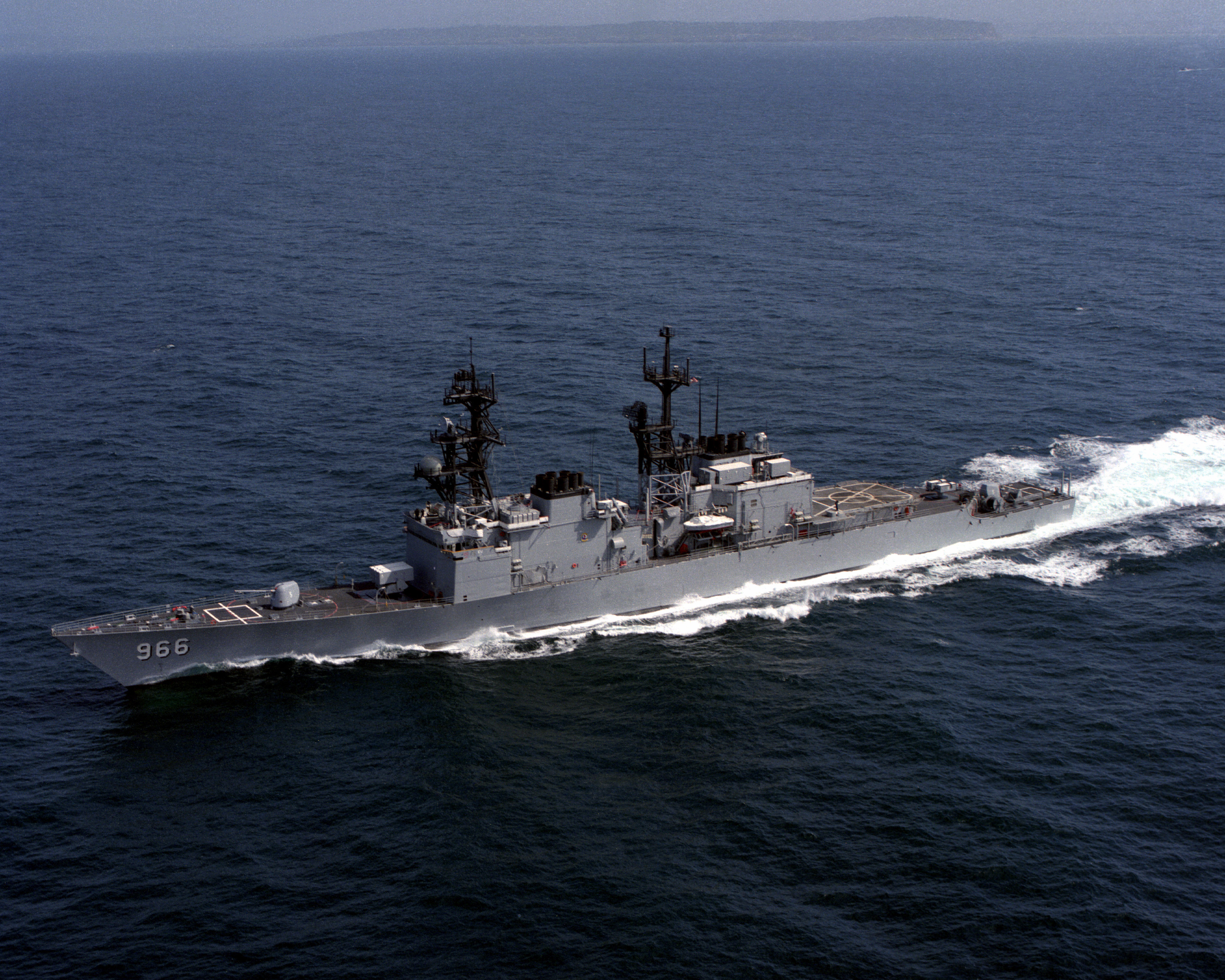 The U.S. Navy destroyer USS Hewitt (DD-966) underway in 1986.